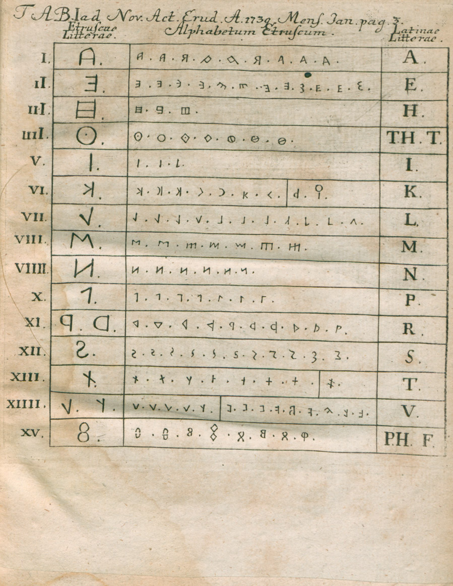 Illustration